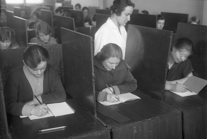 Was soll unser Mädchen werden?! Die allgemeine Intelligenz wird geprüft. Gruppenprüfung von schulentlassenen Mädchen in Einzelboxen auf ihre Fähigkeit zur Stenotypistin.